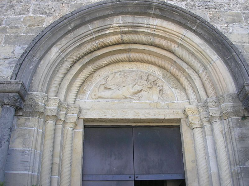 St. Michael (Altenstadt bei Schongau, Obb.). Das Westportal. Eigene Aufnahme, Sept. 2006 / St. Michael (Altenstadt near Schongau, Upper Bavaria, Germany). West door. Own photo, Sept. 2006